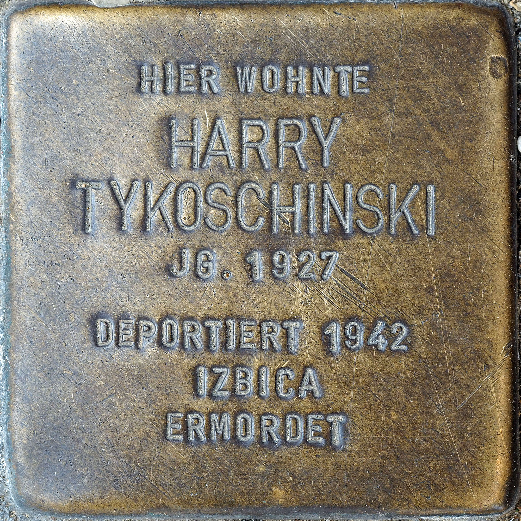 Stolpersteine MG: Tykoschinski, Harry